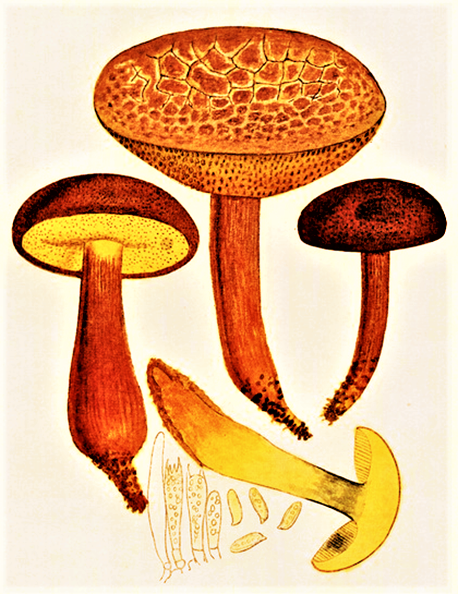 Giacomo Bresadola: Xerocomus rubellus (Krombh.), 1836 ex Quél. (1896)